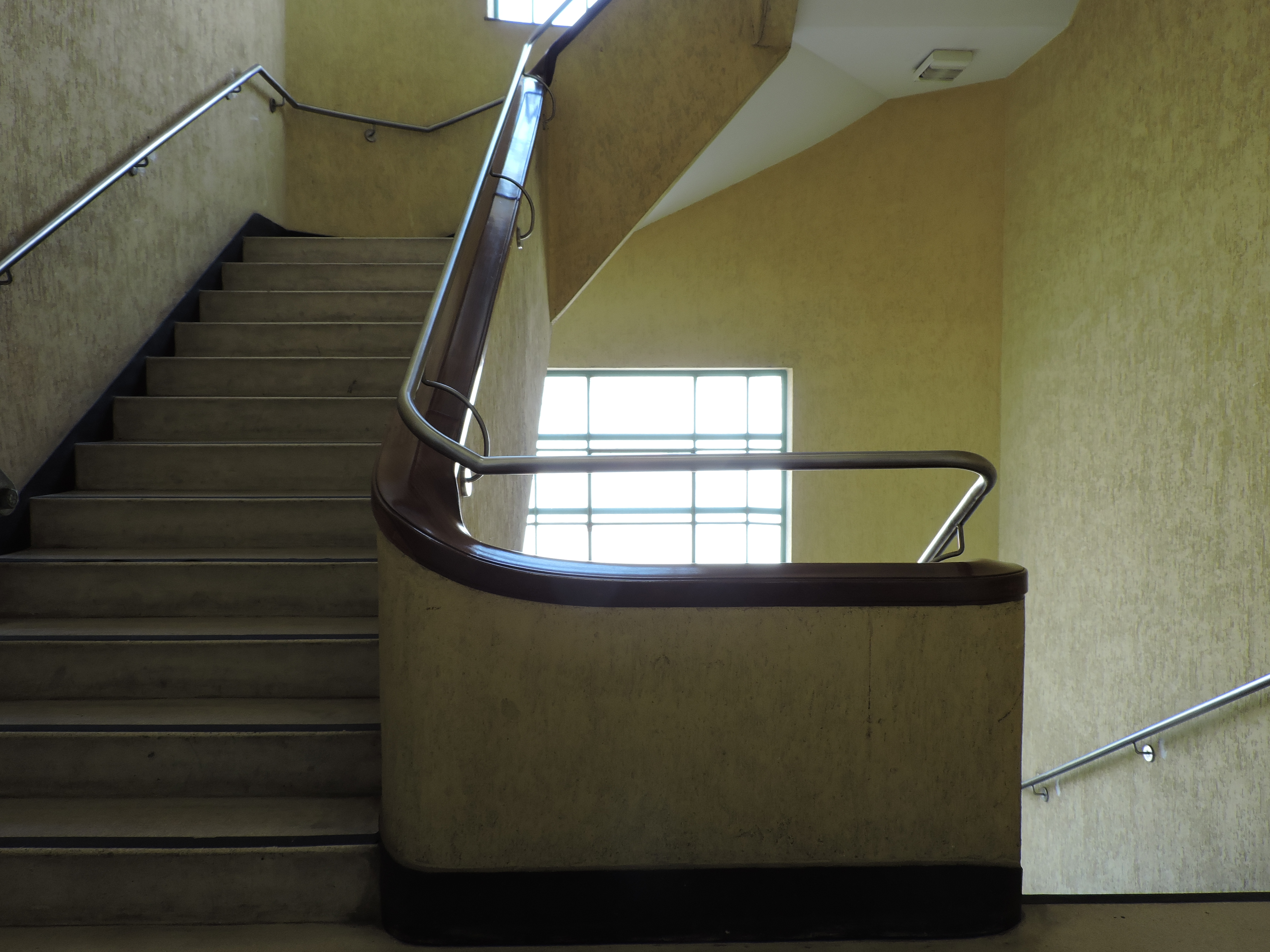 A escadaria do Edifício Saldanha Marinho possui a madeira original preservada. O corrimão foi colocado sem danificar a madeira.